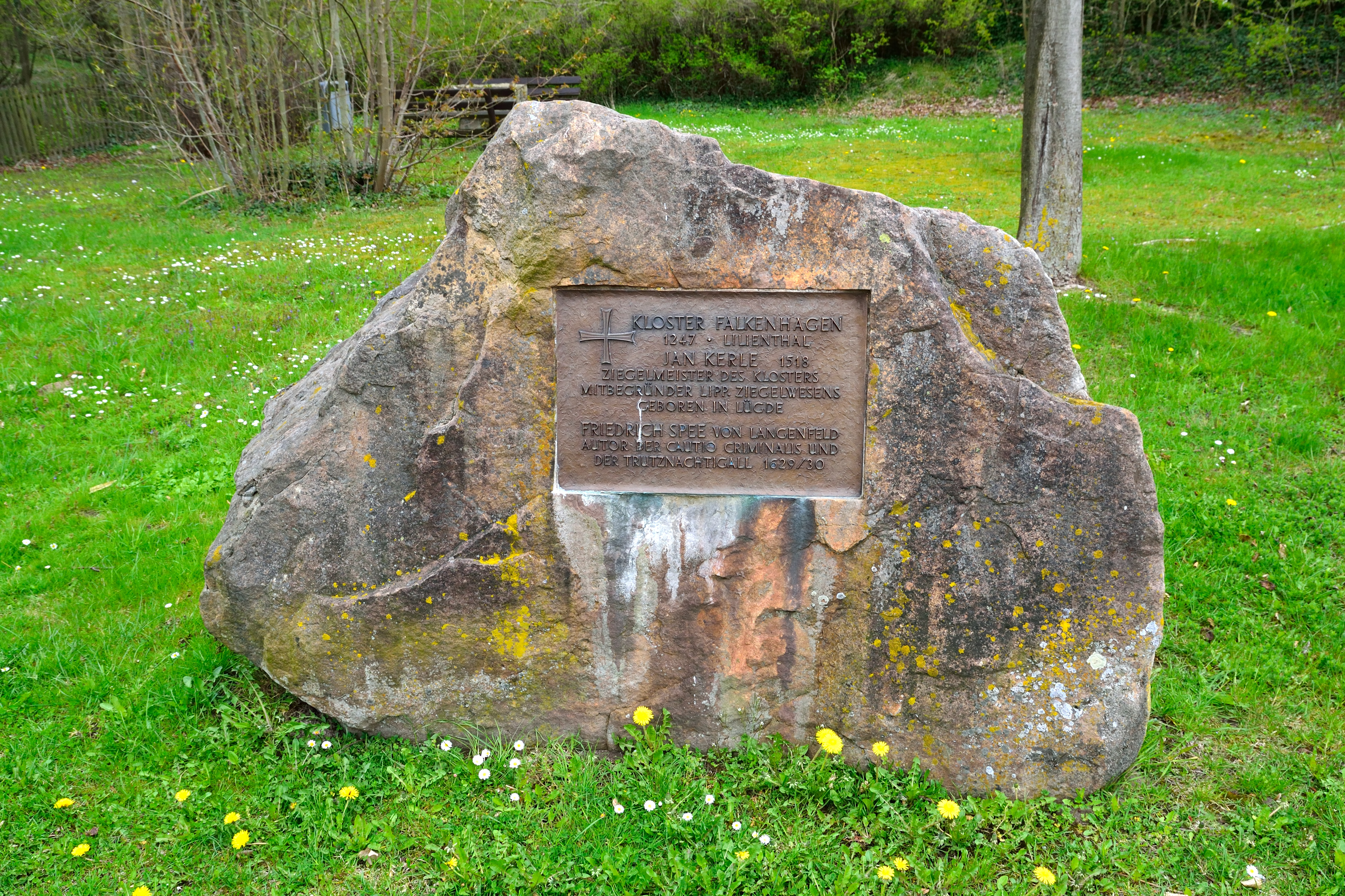 Gedenkstein am Kloster Falkenhagen